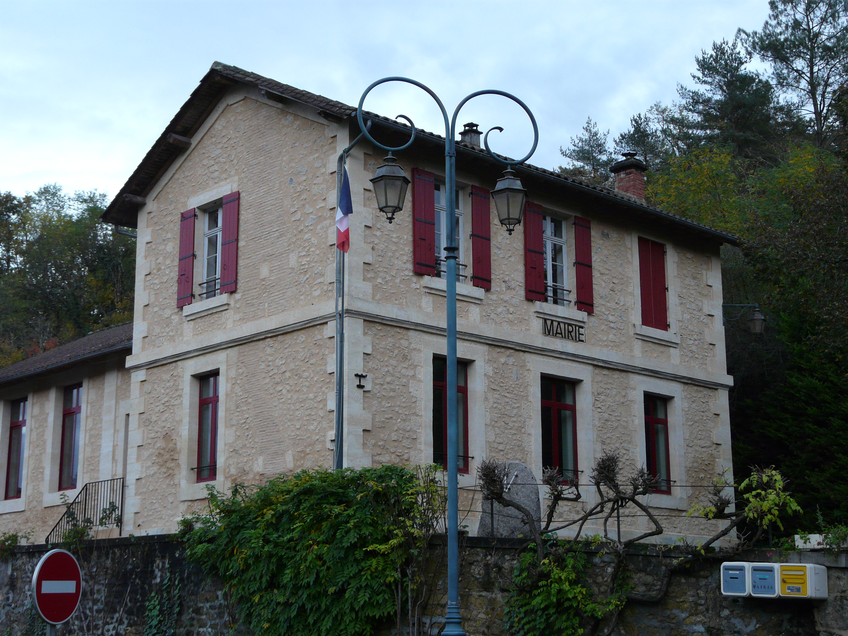 La mairie de Saint-Félix-de-Reillac-et-Mortemart, Dordogne, France.